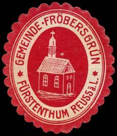 Sealing stamp Title: Gemeinde Fröbersgrün - Fürstenthum Reuss ä. L. Description: rot, weiß Place: Fröbersgrün size: 4x3 cm